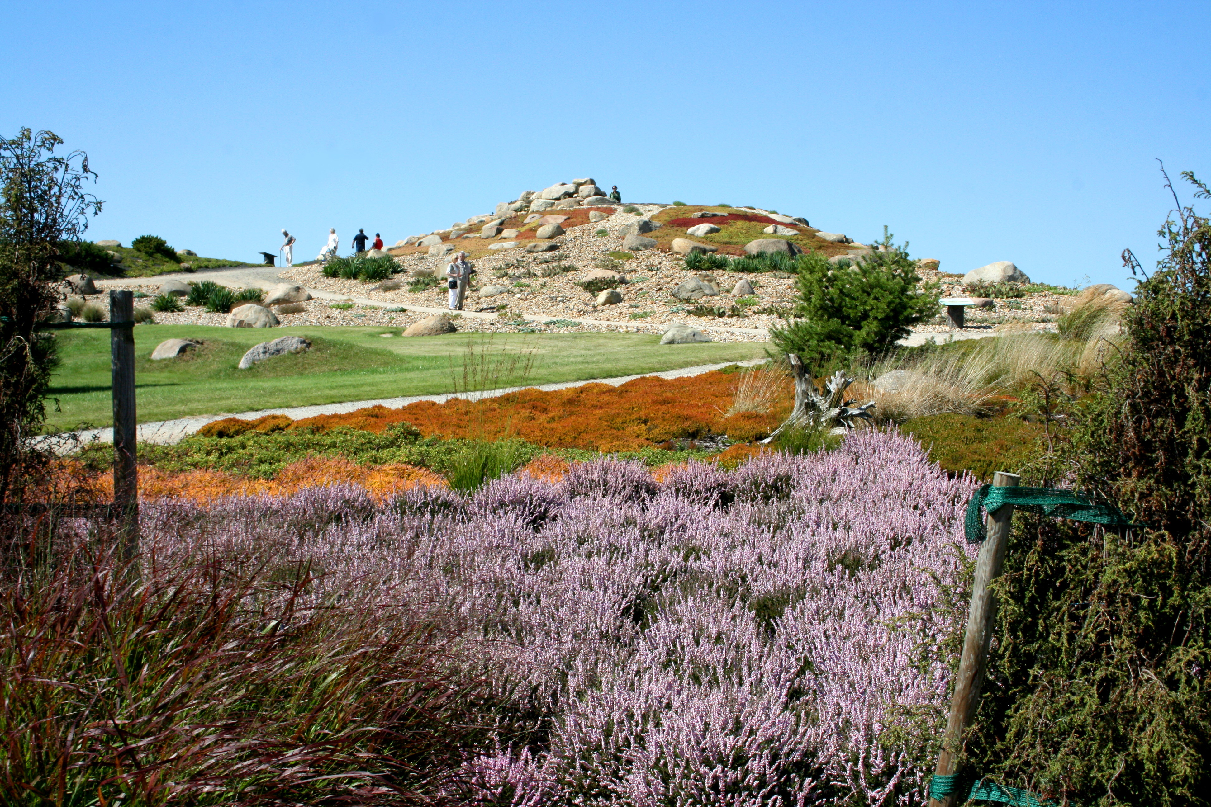 Findlingspark Nochten in Boxberg/O.L.-Nochten